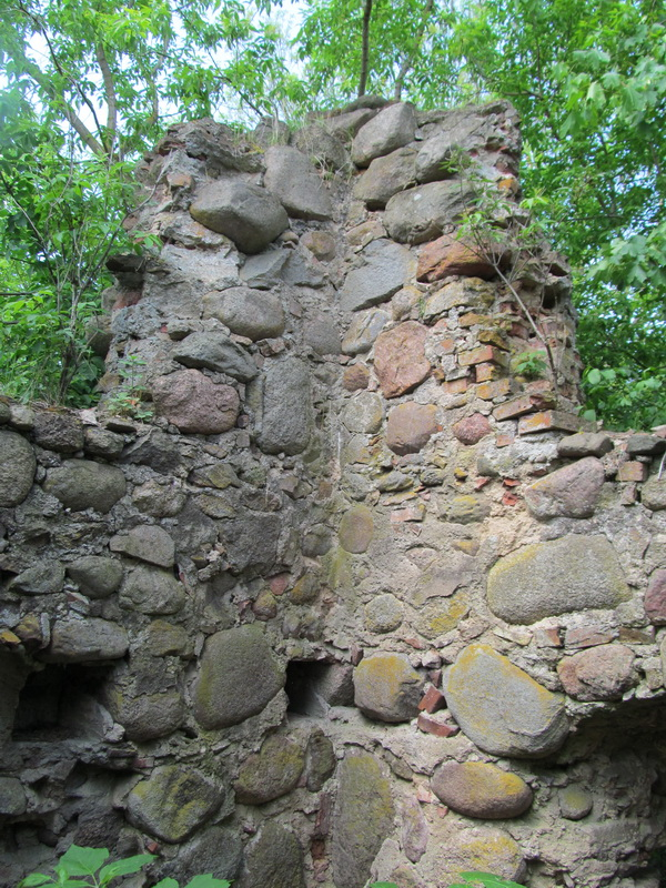 Вялікая Сваротва. Рэшткі лядоўні